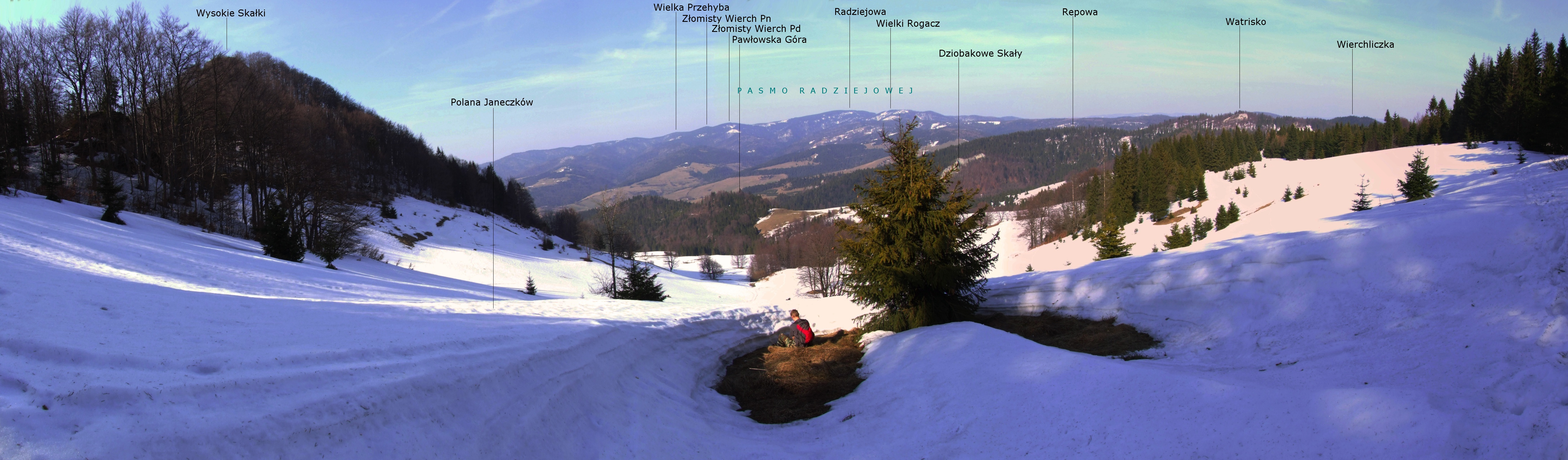 Panorama spod Wysokich Skałek w Pieninach